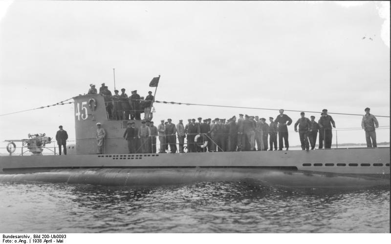 U-45 auf Probefahrt Probefahrt G.580 / U 45. [U-Boot U-45.- Probefahrt vor Indienststellung, Besatzung auf Deck.]